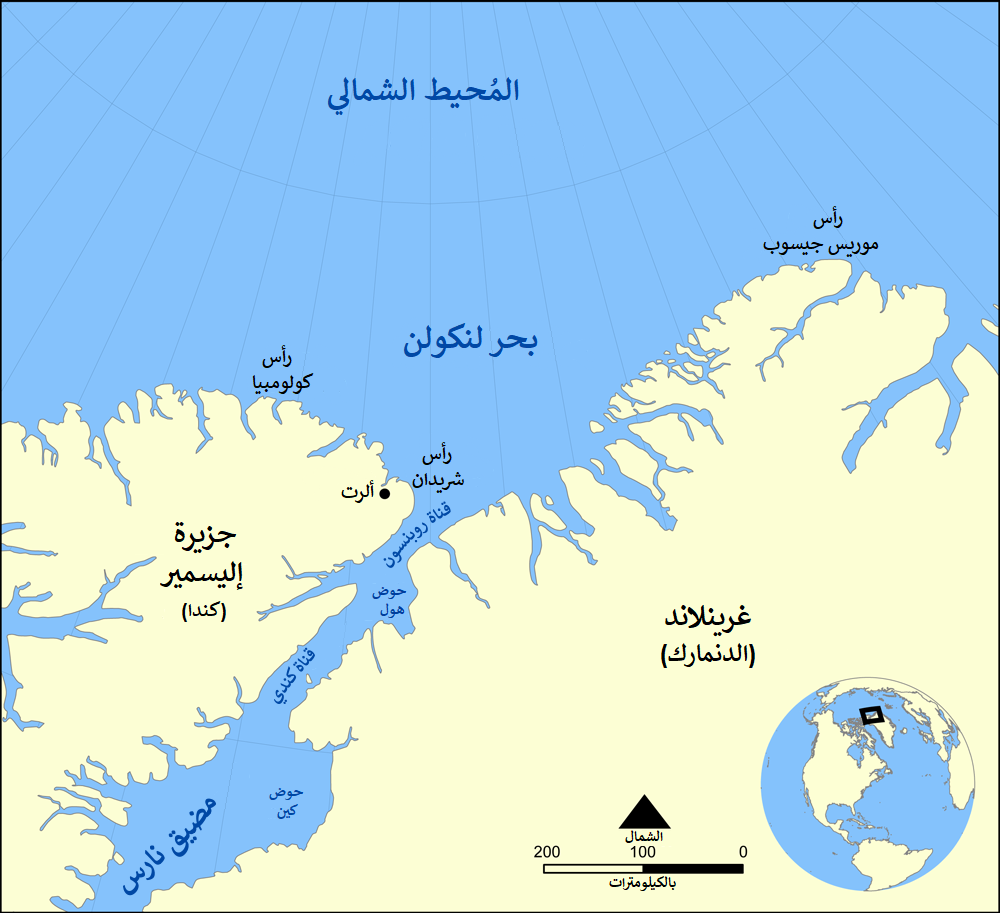 خريطة تُظهر موقع بحر لنكولن، وهو جُزءٌ من المُحيط الشمالي. كما تُظهر موقع رأسيّ كولومبيا وموريس جيسوب.